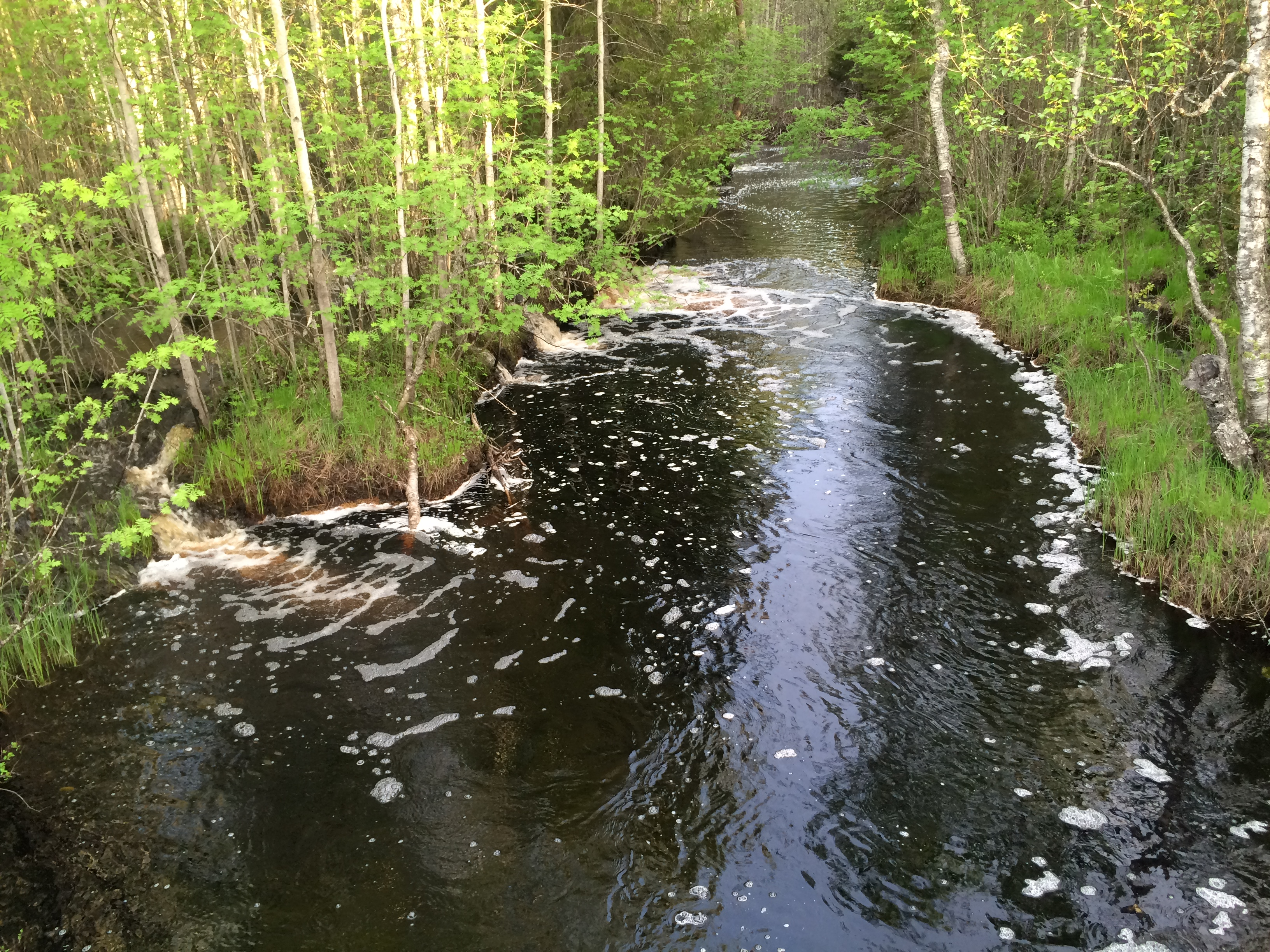 Сигма (приток Куземы)